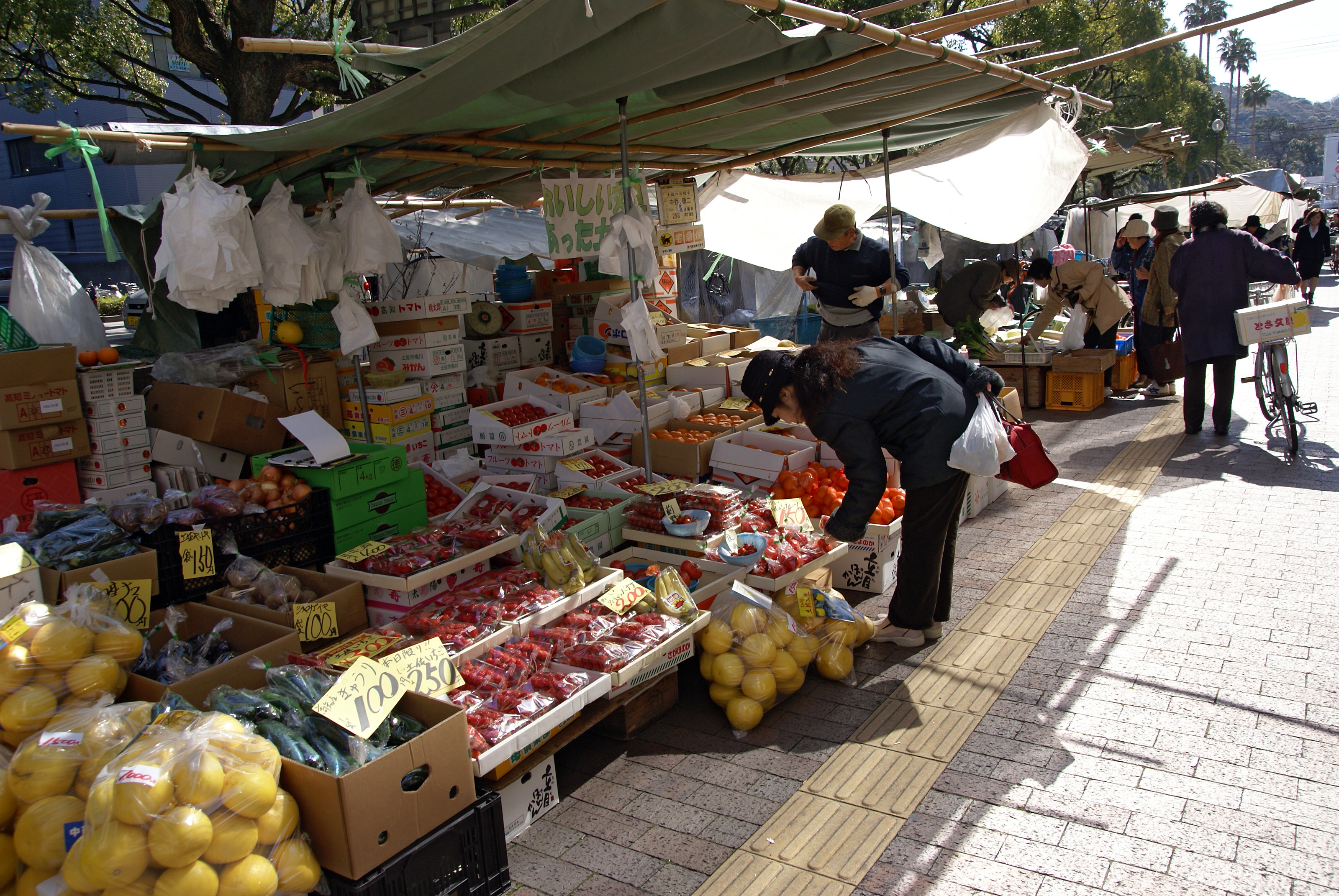 Mokuyo-ichi in Kochi, Kochi prefecture, Japan